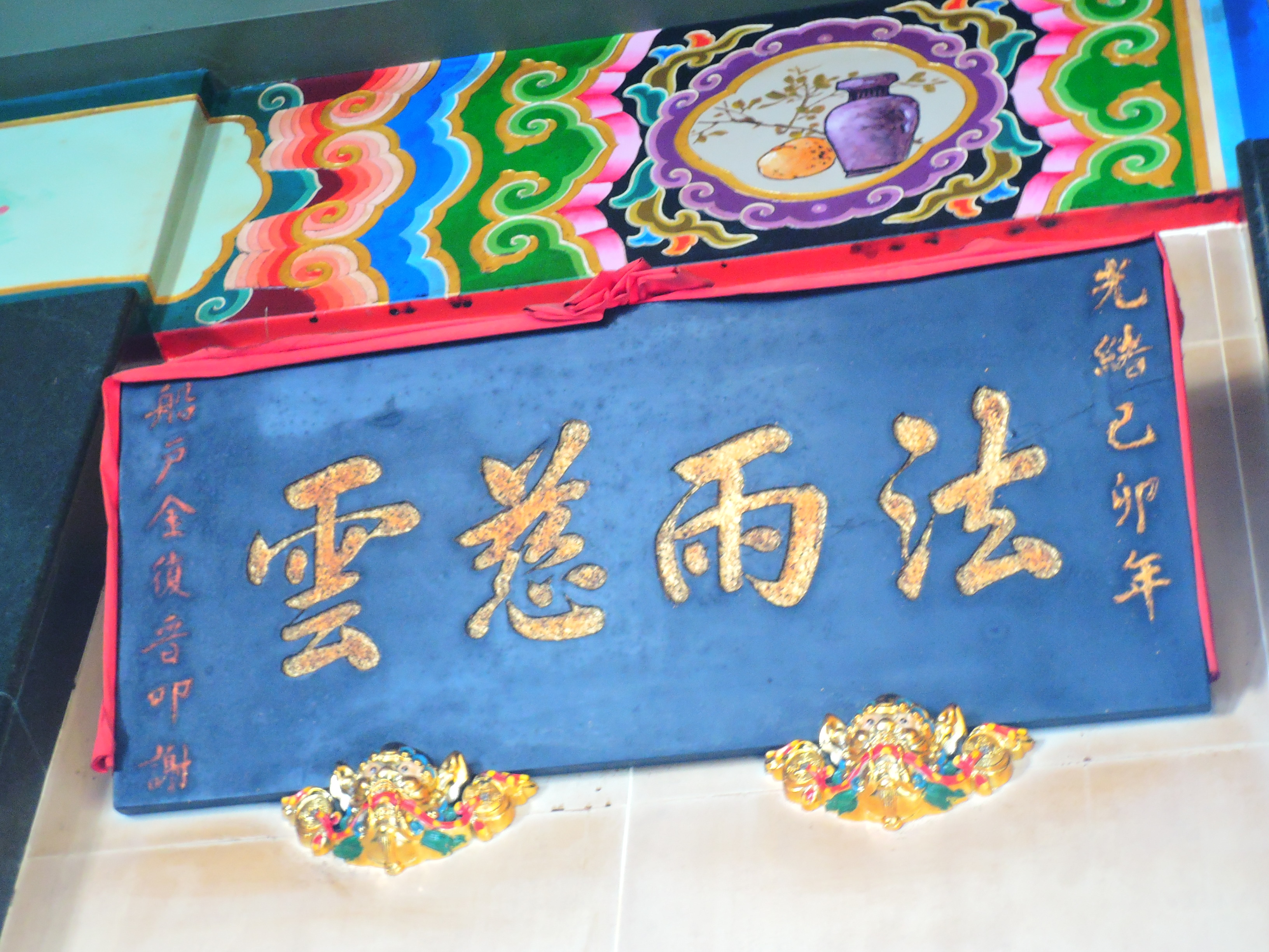 虎井嶼虎井觀音廟，主祀觀世音菩薩。